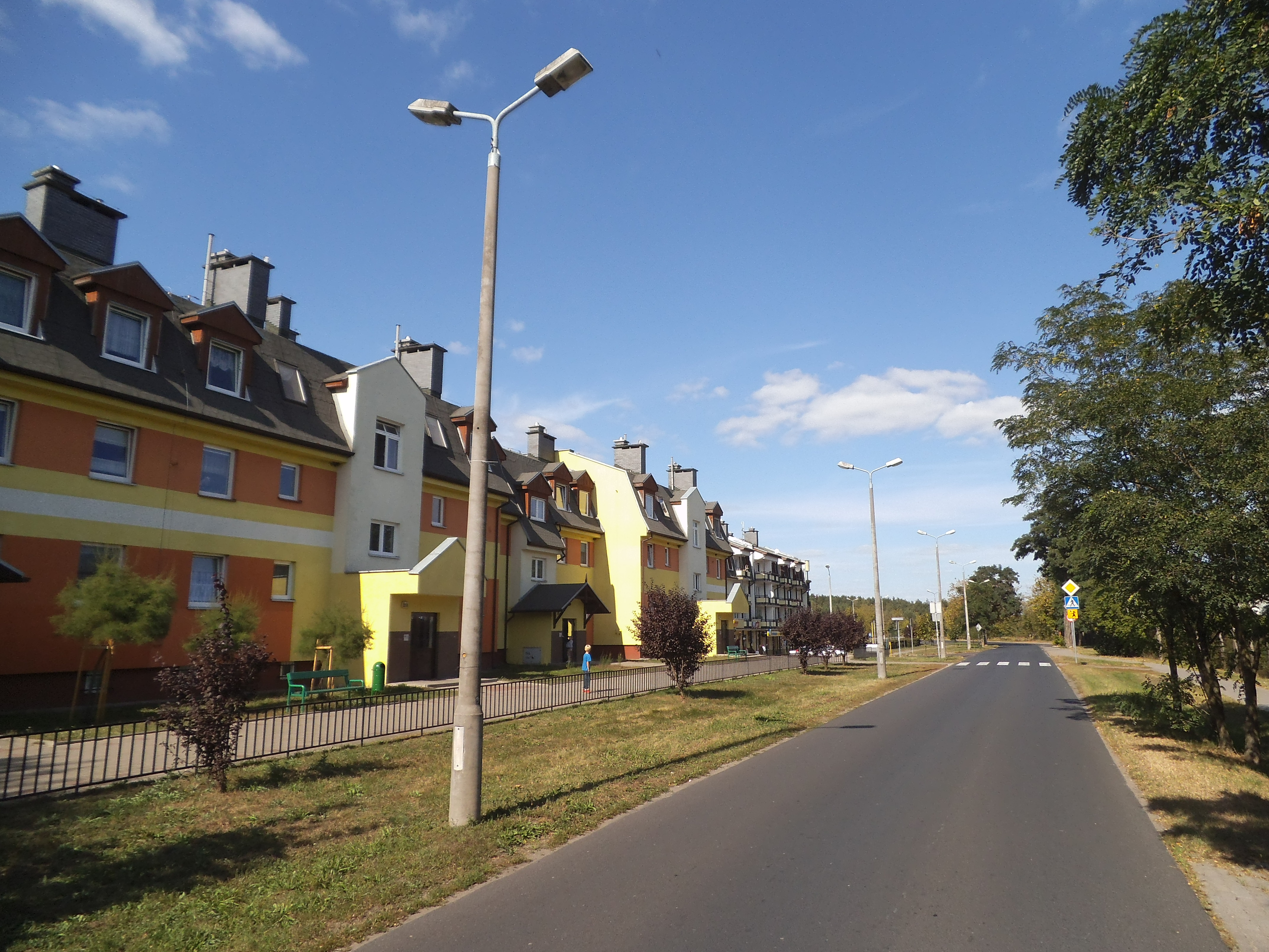 Fragment ul. Włocławskiej na terenie Czerniewic